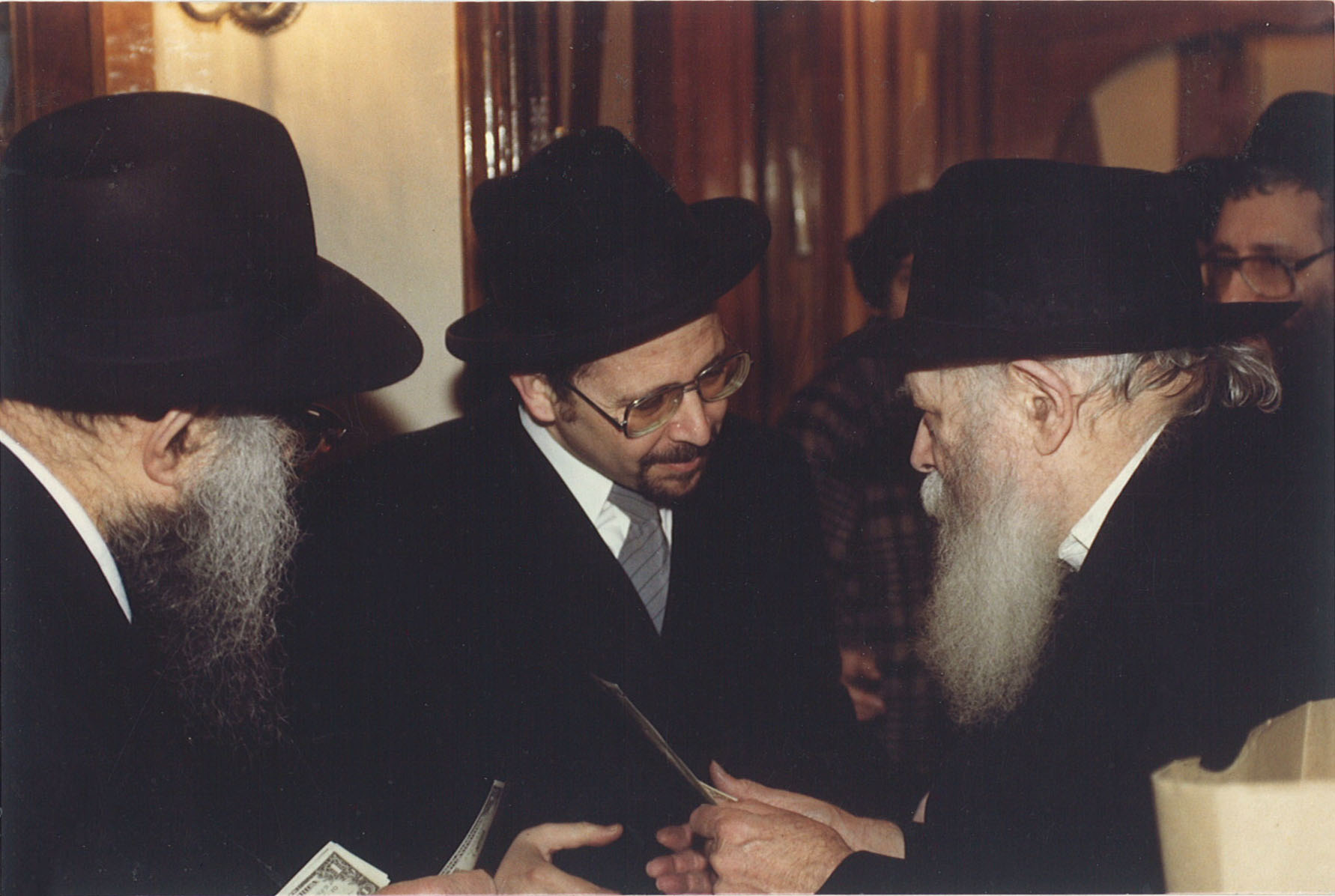 Ahron Daum reçu en audience par Menachem Mendel Shneerson, le dernier “Lubavitcher Rebbe”